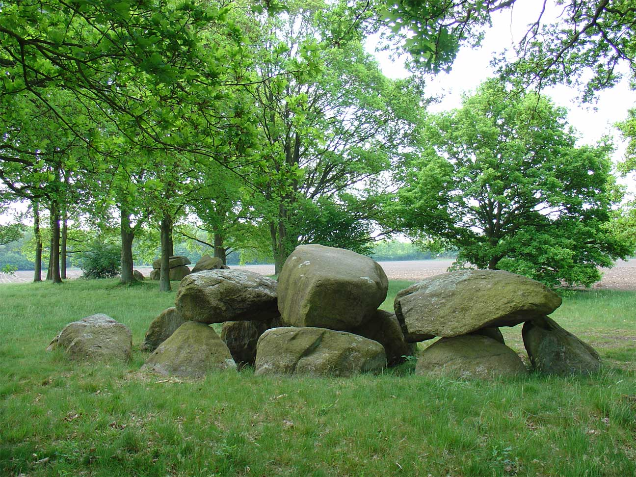 Hunebed D28 tussen Borger en Buinen